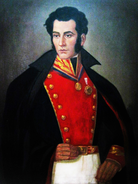 Jose Antonio de Sucre